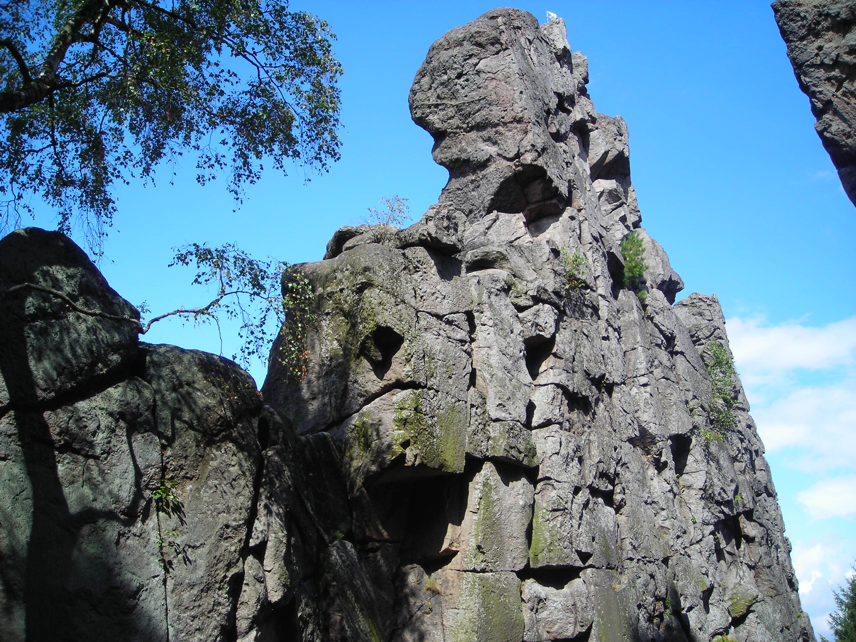 Vraní skály v CHKO Lužické hory u Horního Sedla, místní části Hrádku nad Nisou. Fellerova věž.